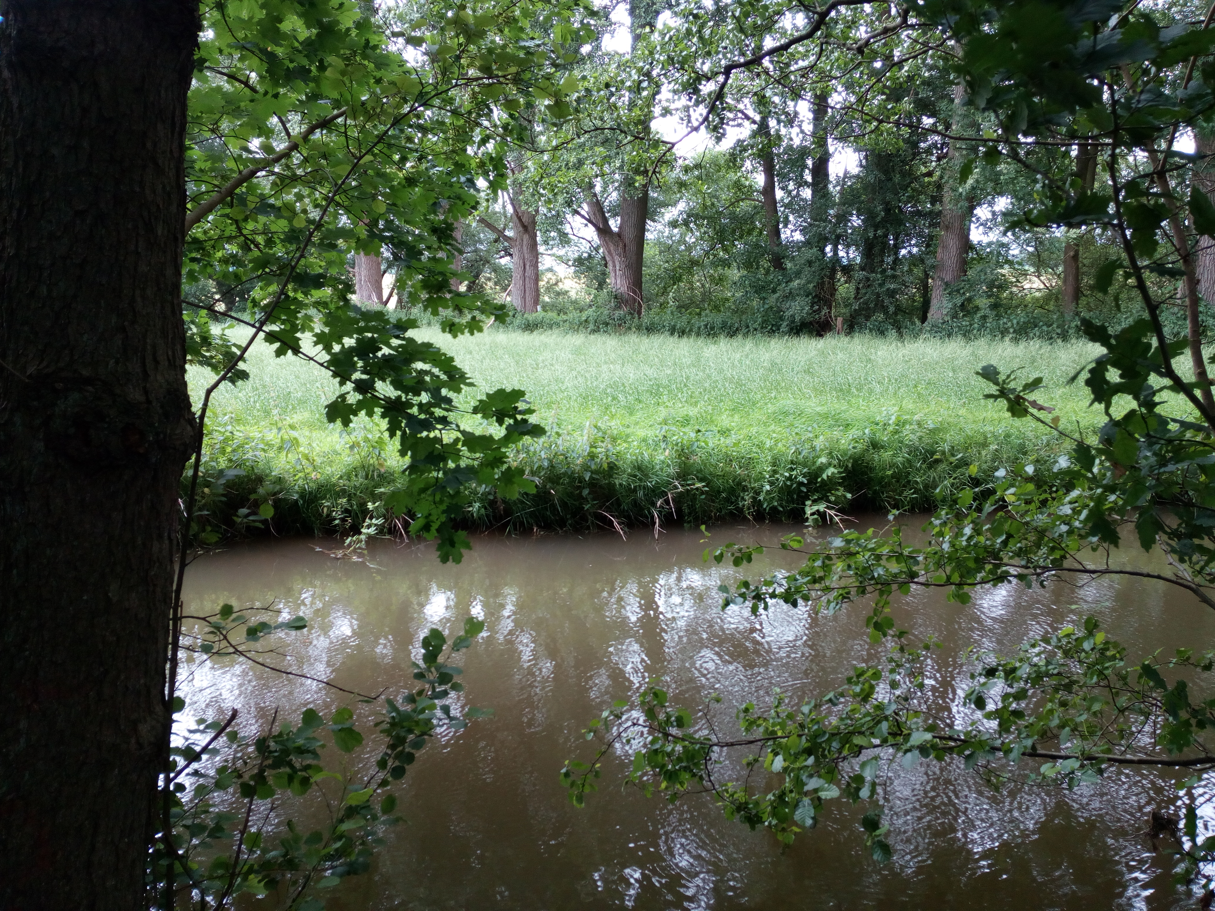 Hier findet ihr nicht nur die Warmenau, sondern auch einen Teich sowie viel unberührte Natur. Die Bilder sind beidseits der Durchgangsstraße in Wallenbrück entstanden.